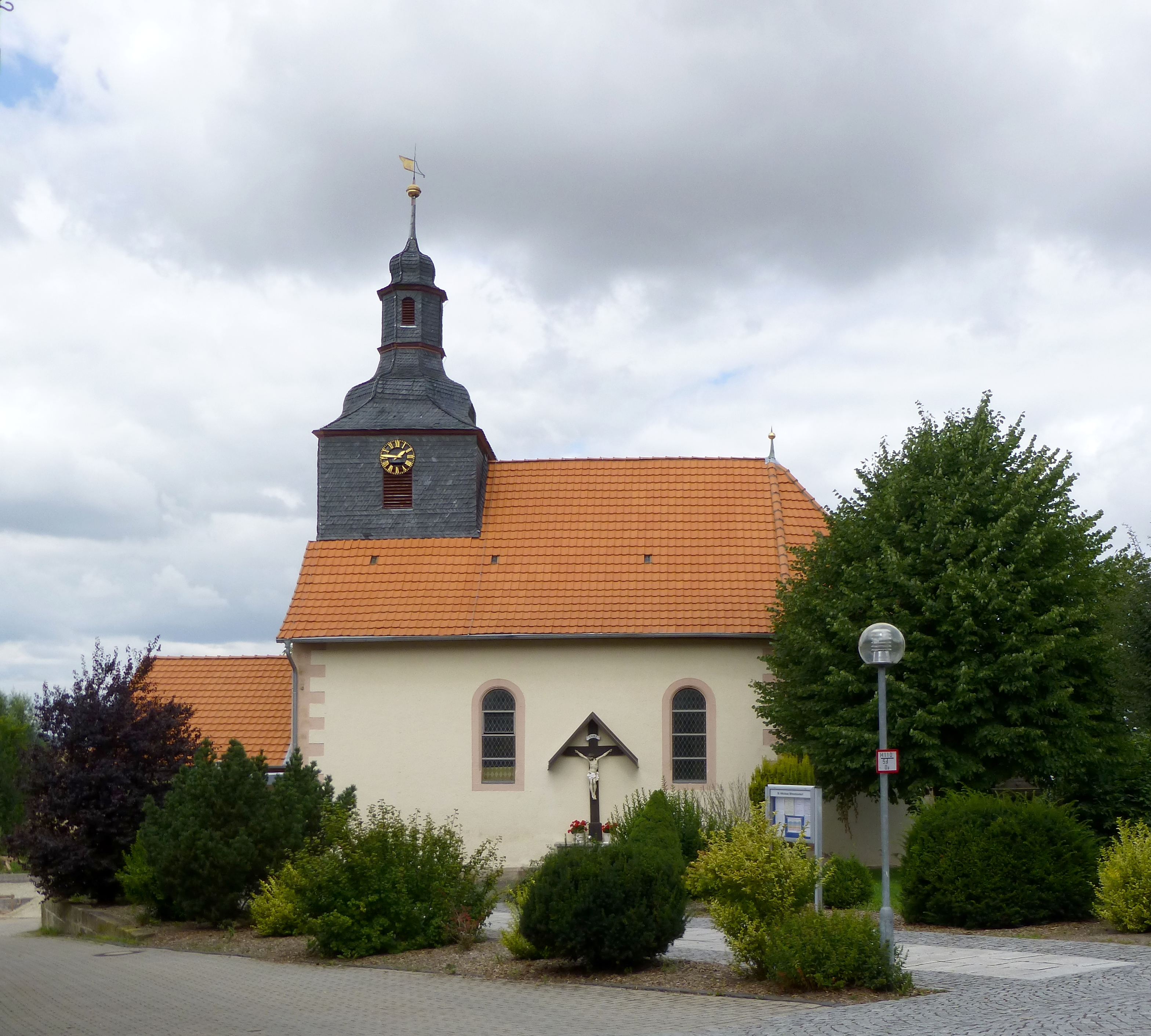 Katholische Kirche St. Nikolaus in Böseckendorf, Landkreis Eichsfeld. Erbaut 1713/14